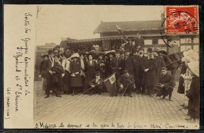 Fotografía de la reunión de los grupos esperantistas de St. Chamond y St Etienne (Francia) celebrada el es:5 de mayo de es:1910. Por su fecha de publicación y envío (también fue utilizada como tarjeta postal) la imagen es considerada del dominio público y fue tomada de